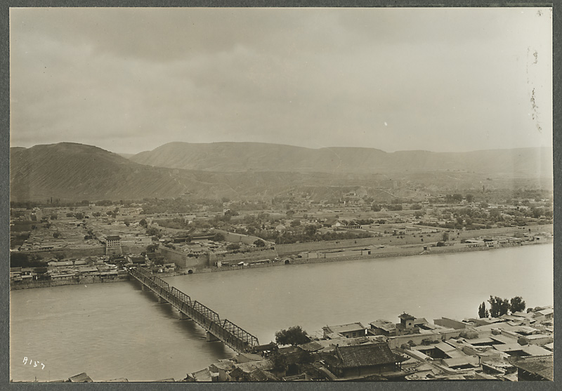 兰州白塔山俯瞰黄河